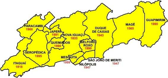 mapa das cidades e os anos de emancipação